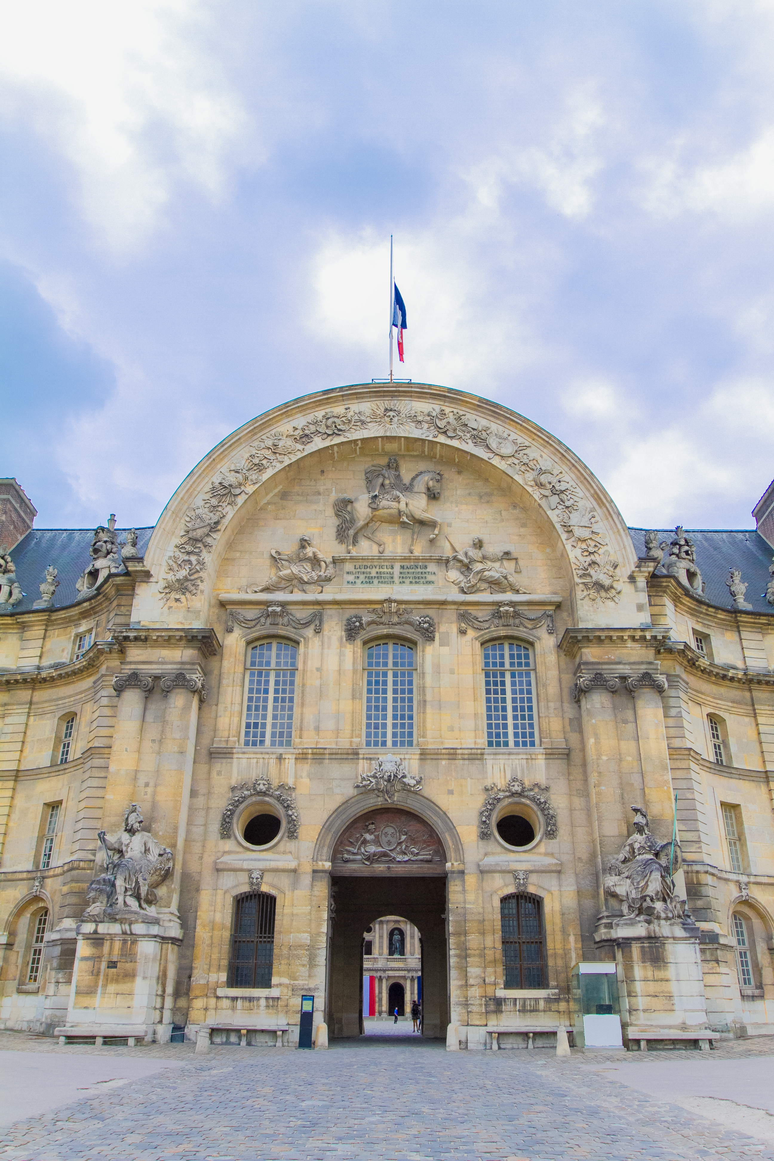 Hôtel des Invalides .